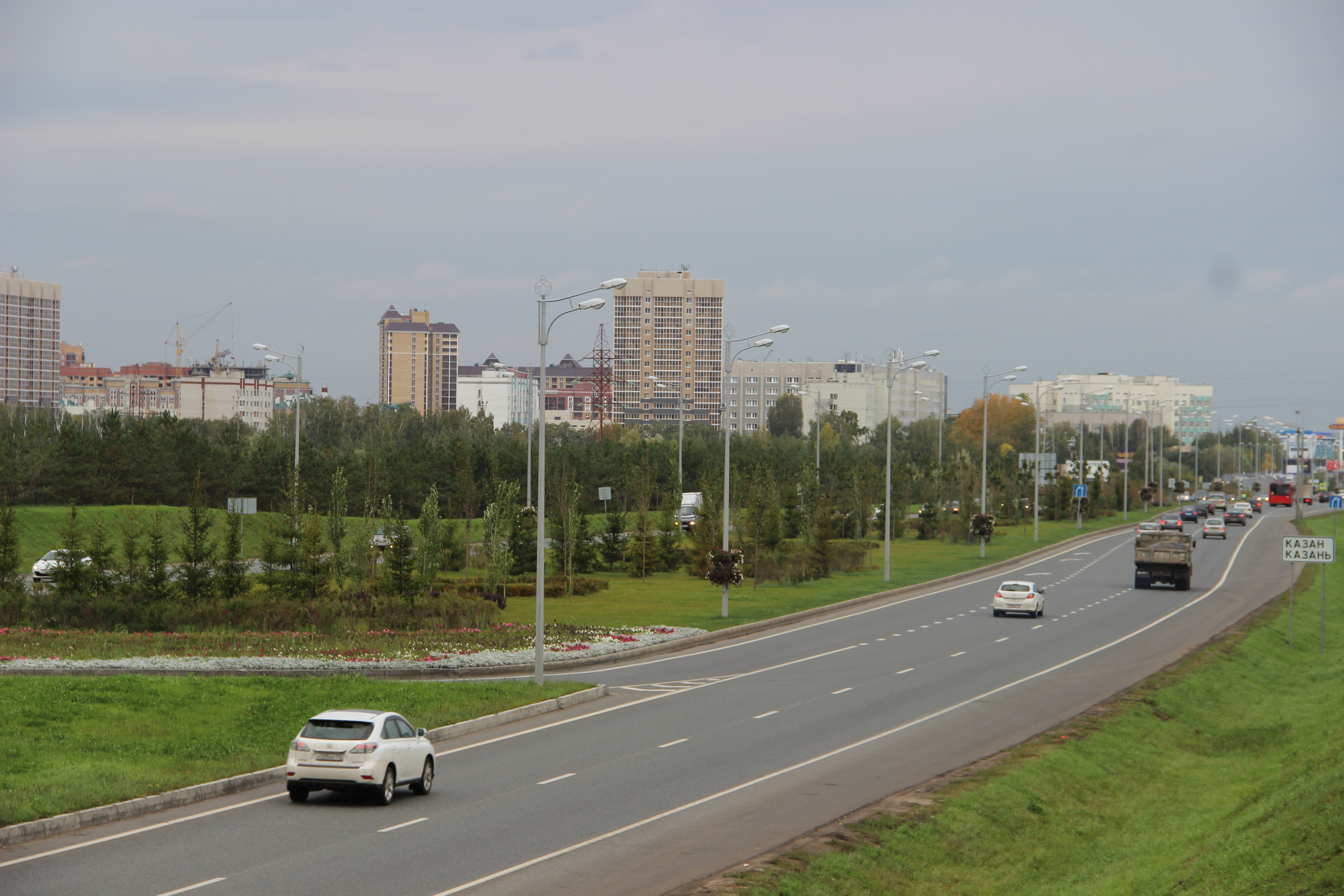 Въезд в Казань по Оренбурскому тракту. Казань. РТ. Сентябрь 2013